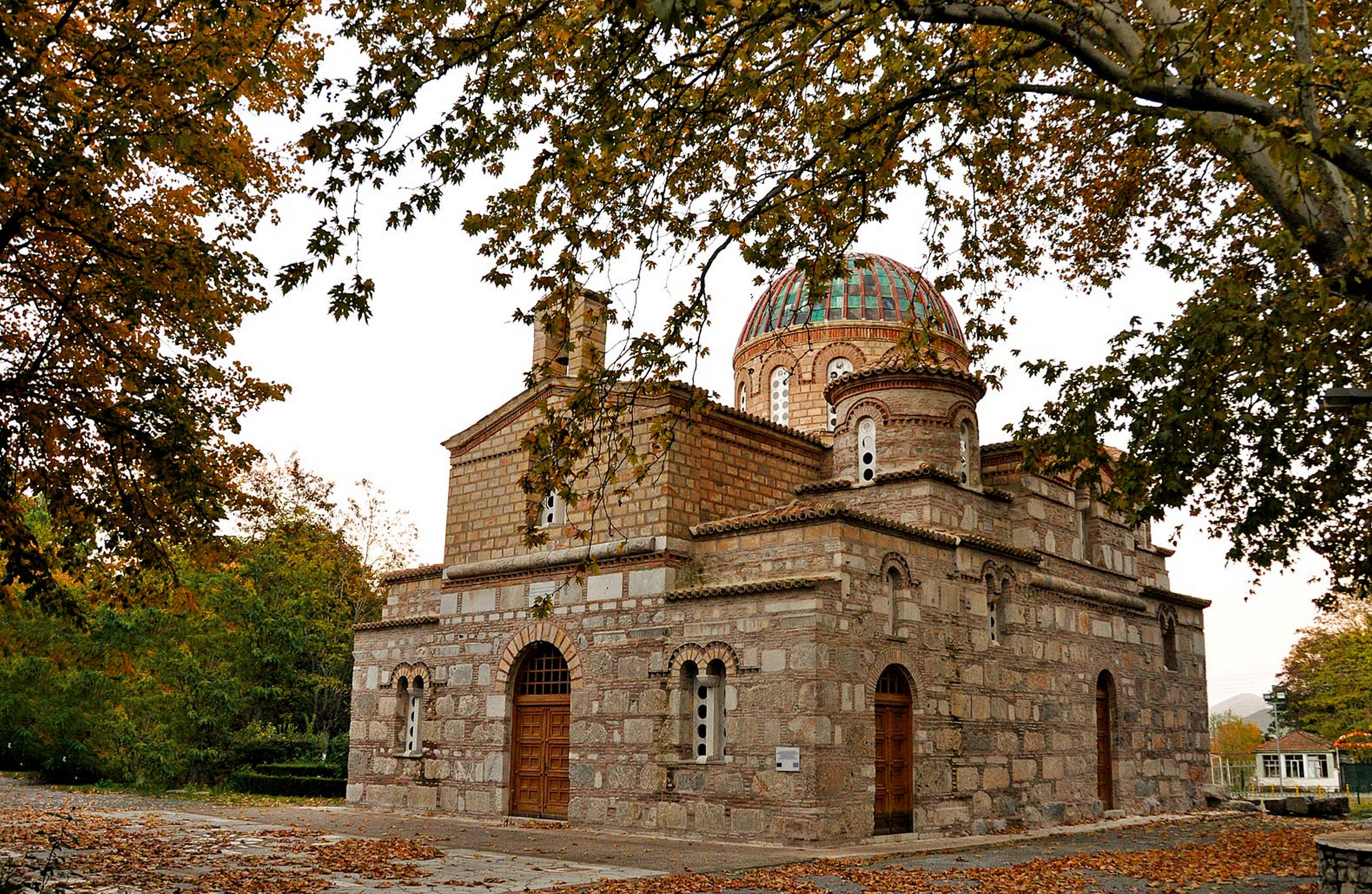 Ναός Επισκοπής Τεγέας